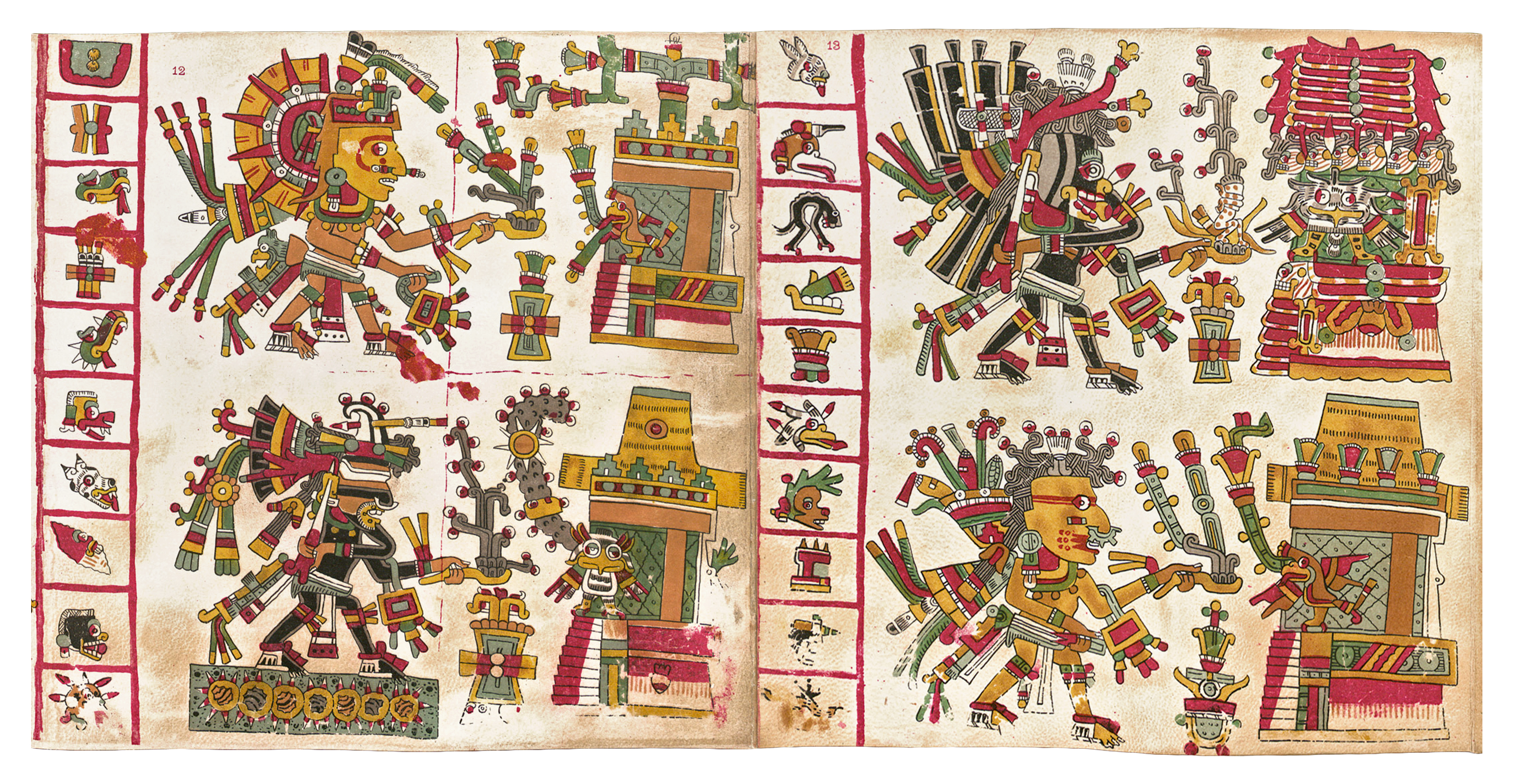 Pages 12 et 13 du Codex Cospi. Les 4 points cardinaux aztèques et les 20 signes associés du Tonalpohualli. Foundation for the Advancement of Mesoamercan Studies, Inc. (FAMSI).